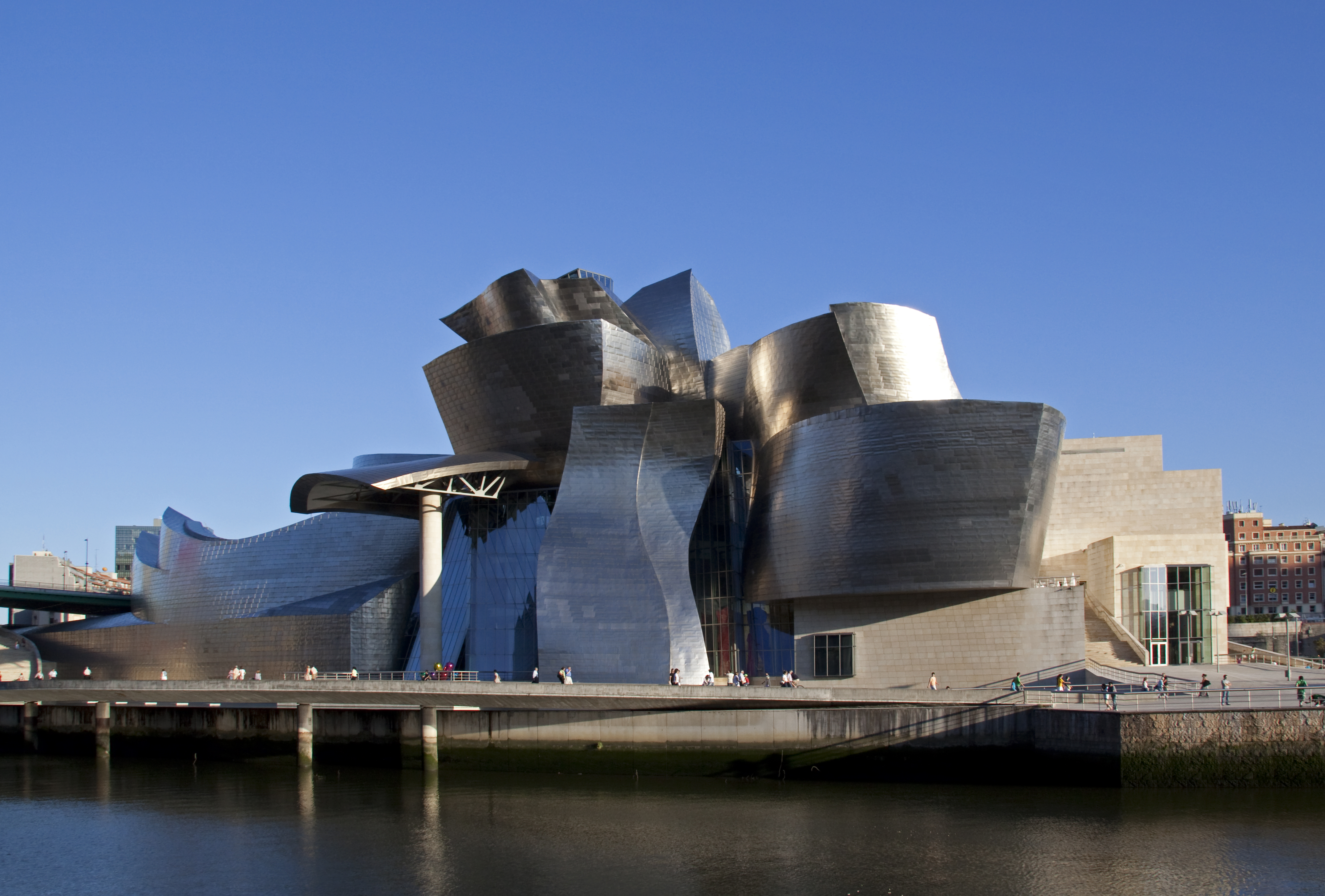 Guggenheim Museum Bilbao designed by Frank Gehry